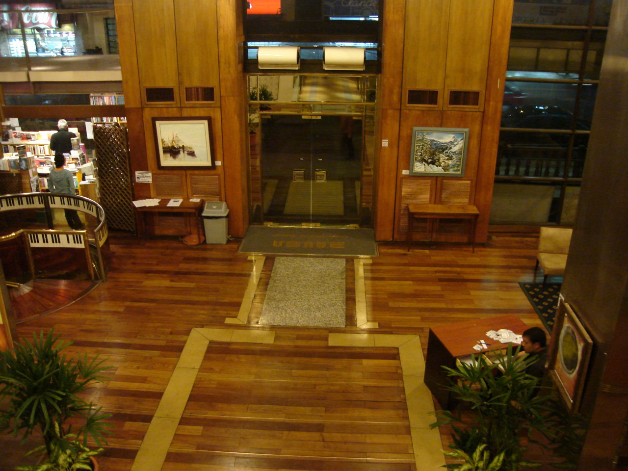 Vestíbulo del Hotel Bauen